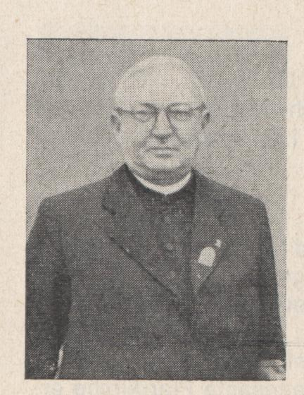 Pfarrer Alois Konrath, Ensheim